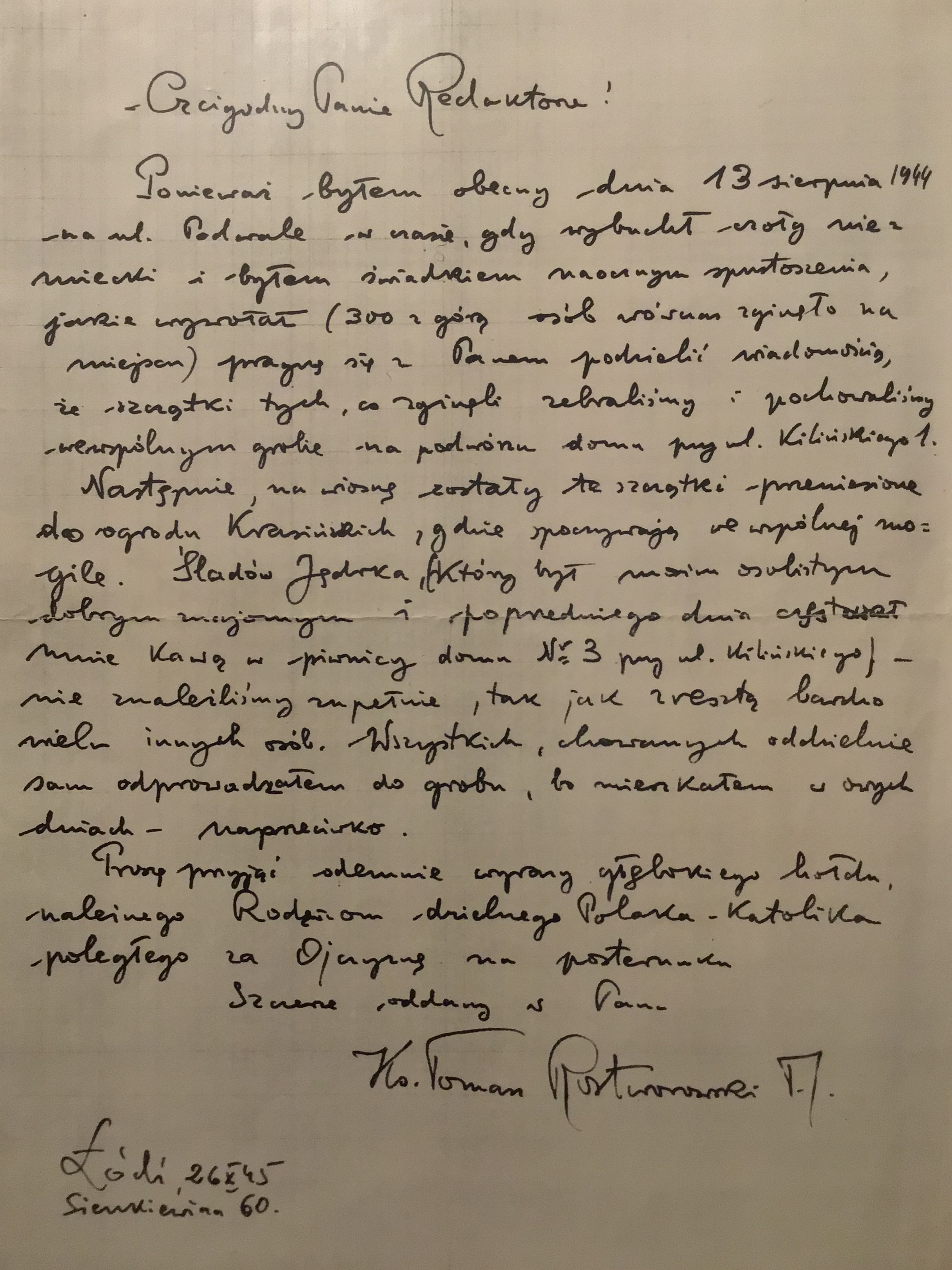 List kapelana do red. zygmunta Augustyńskiego